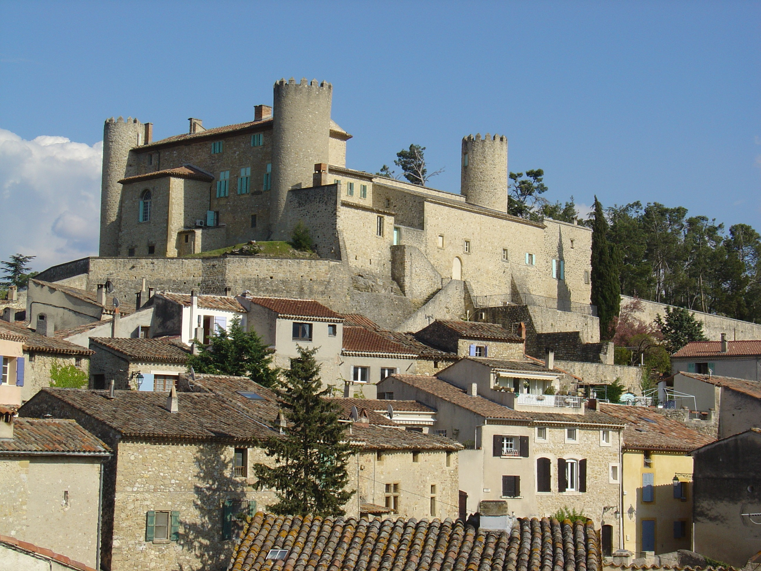 Description : Le château de Mirabeau - Vaucluse (84)- France Source : image personnelle